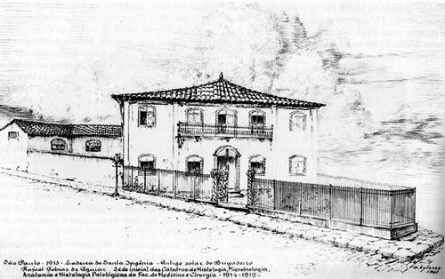 Fotografia do antigo Palacete do Acu, também conhecido como Solar Brigadeiro Tobias. Estava localizado na rua Alegre, atual rua Tobias de Aguiar, na cidade de São Paulo. O local foi uma das residências da Marquesa de Santos. O edifício também foi sede da Escola de Farmácia, da Pensão Suissa, do Conservatório Dramático e Musical de São Paulo e de uma seção da Faculdade de Medicina. O prédio foi demolido em 1925.